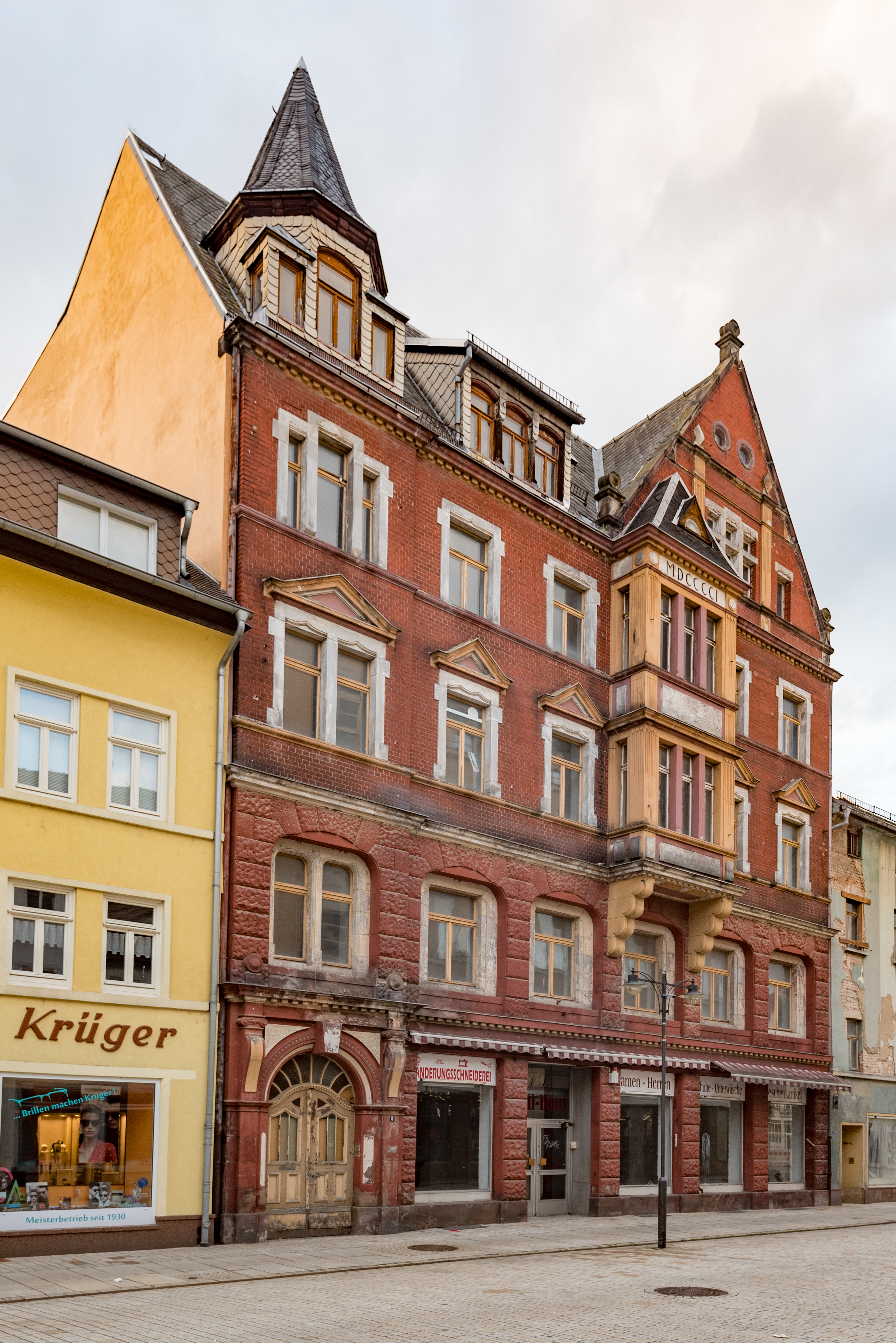 Weißenfels, Jüdenstraße 5